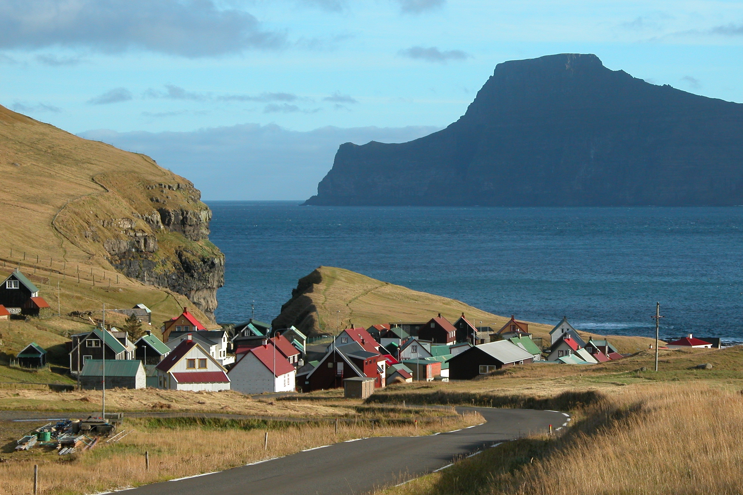 Gjógv in Eysturoy, Faroe Islands.